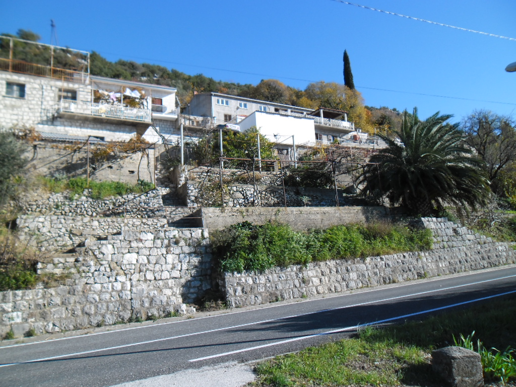 selo Kručica, Dubrovačko primorje